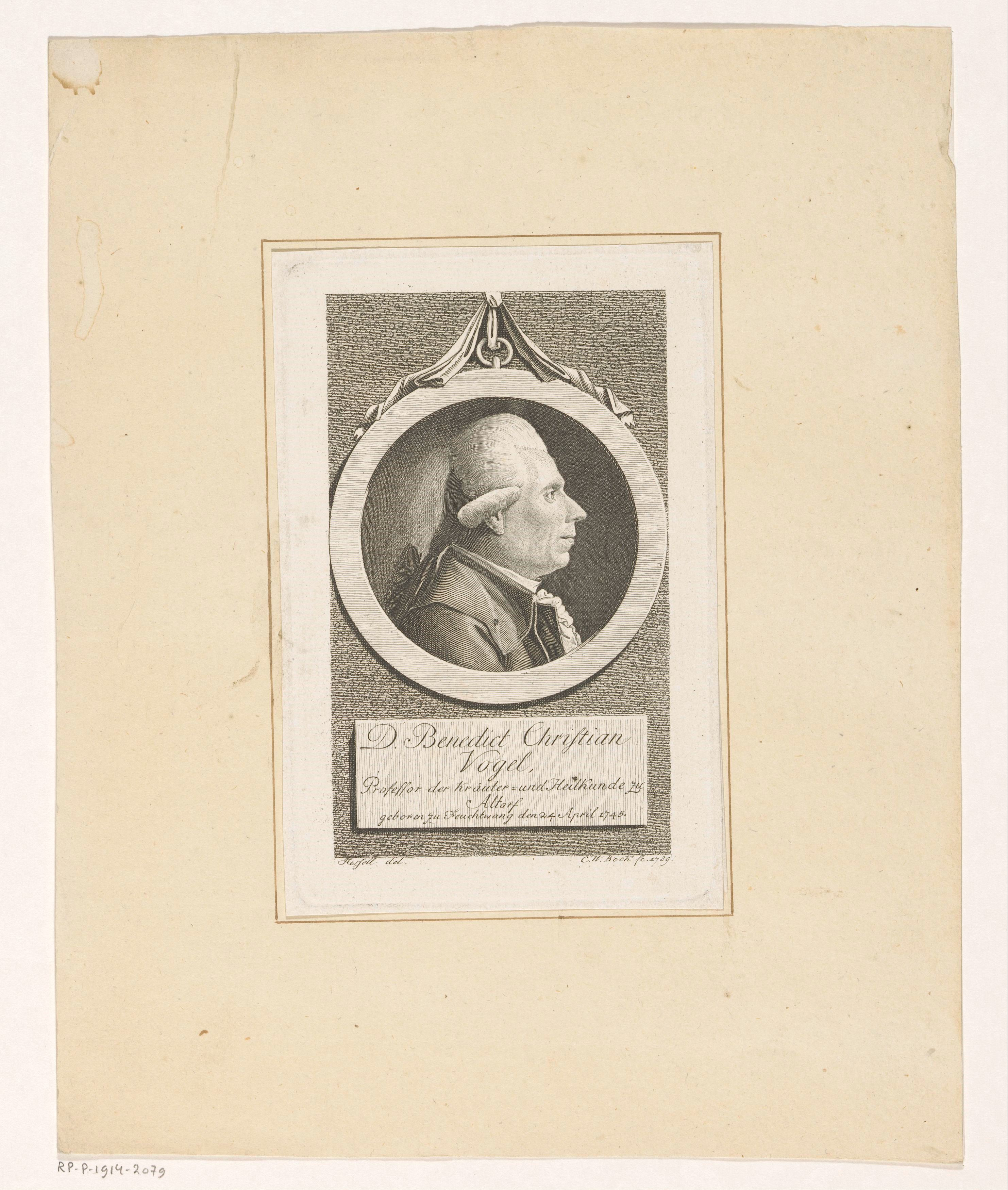 IdentificatieTitel(s): Portret van Benedict Christian VogelObjecttype: prent Objectnummer: RP-P-1914-2079Catalogusreferentie: HAB A 22873VervaardigingVervaardiger: prentmaker: Christoph Wilhelm Bock (vermeld op object)naar tekening van: Leonhard Heinrich Hessell (vermeld op object)Plaats vervaardiging: NeurenbergDatering: 1789Materiaal: papier Techniek: graveren (drukprocedé) / etsen / stippelwerkAfmetingen: plaatrand: h 149 mm × b 97 mmOnderwerpWat: historical personsWie: Benedict Christian VogelVerwerving en rechtenVerwerving: aankoop 1905Copyright: Publiek domein